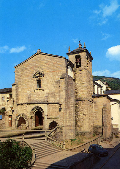 Iglesia de San Francisco en Vivero Fotografía realizada por Lourdes Cardenal en agosto de 1990.